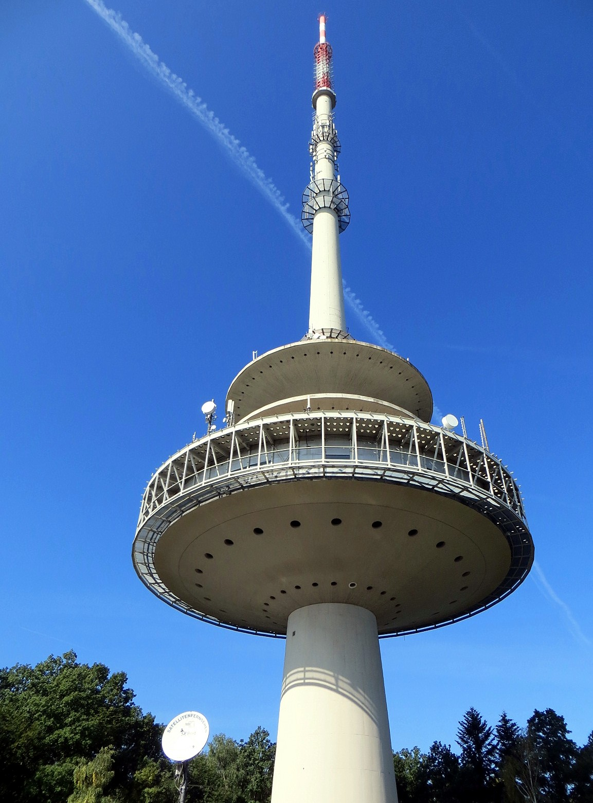 Sender, Fernmeldeturm Stuttgart (Frauenkopf)